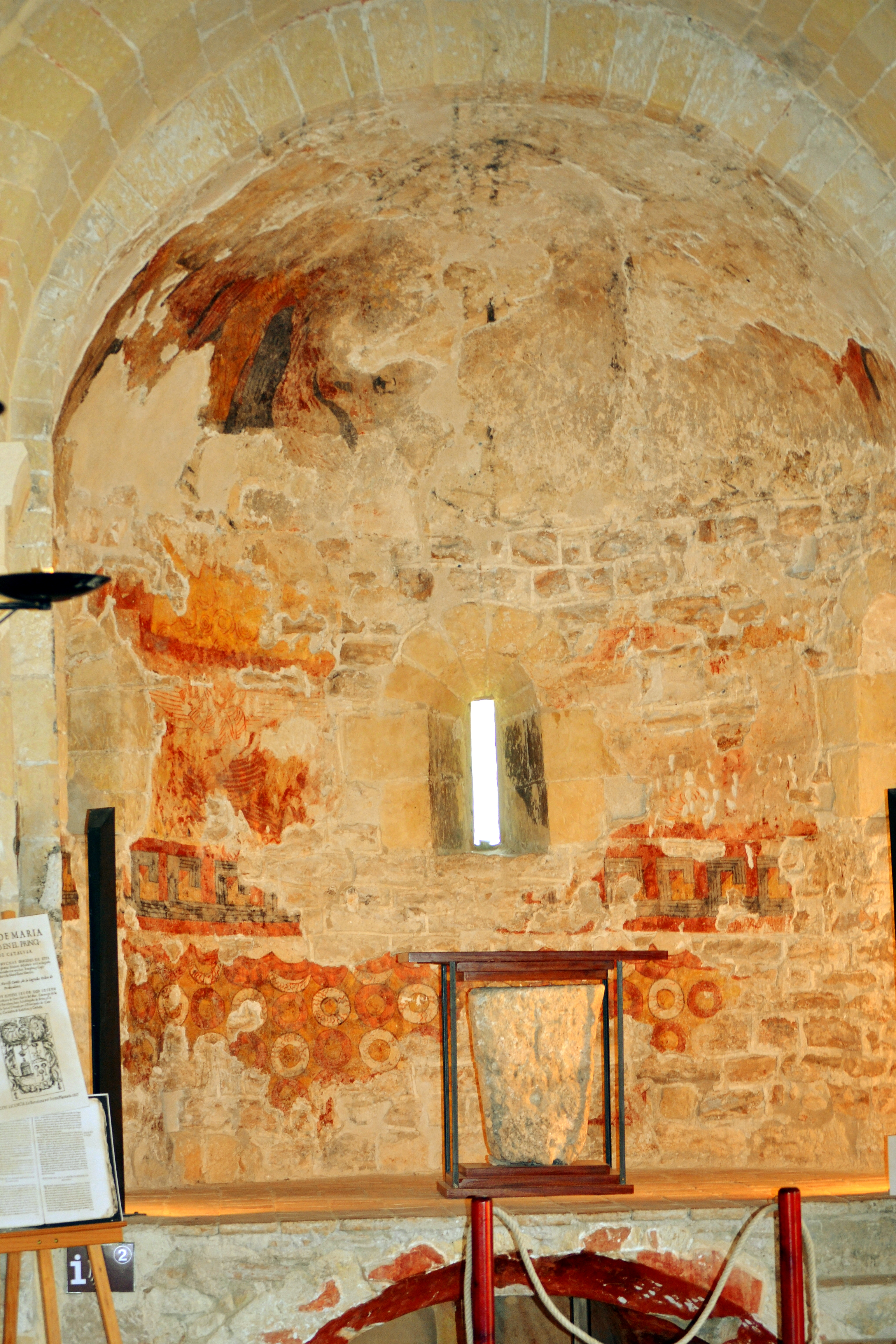 Absis capella del castell de Calafell